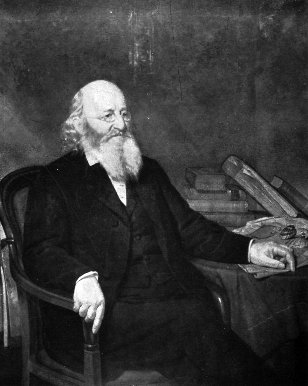 Portrait de Jared Potter Kirtland (1793-1877)